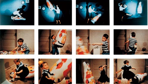 Bobo Doll Deneyi